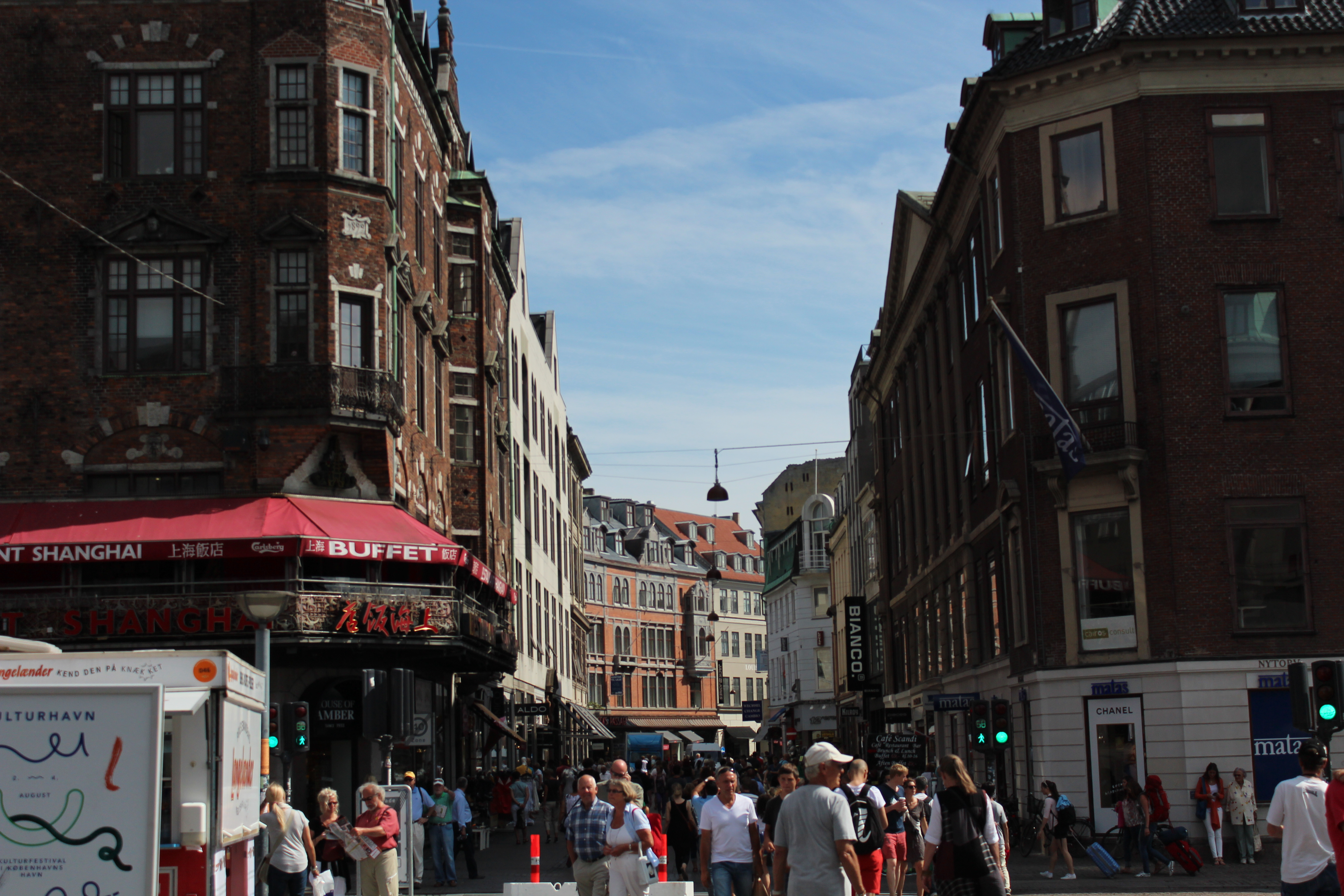 Strøget seen from Gammeltorv/Nytorv in Copenhagen, Denmark